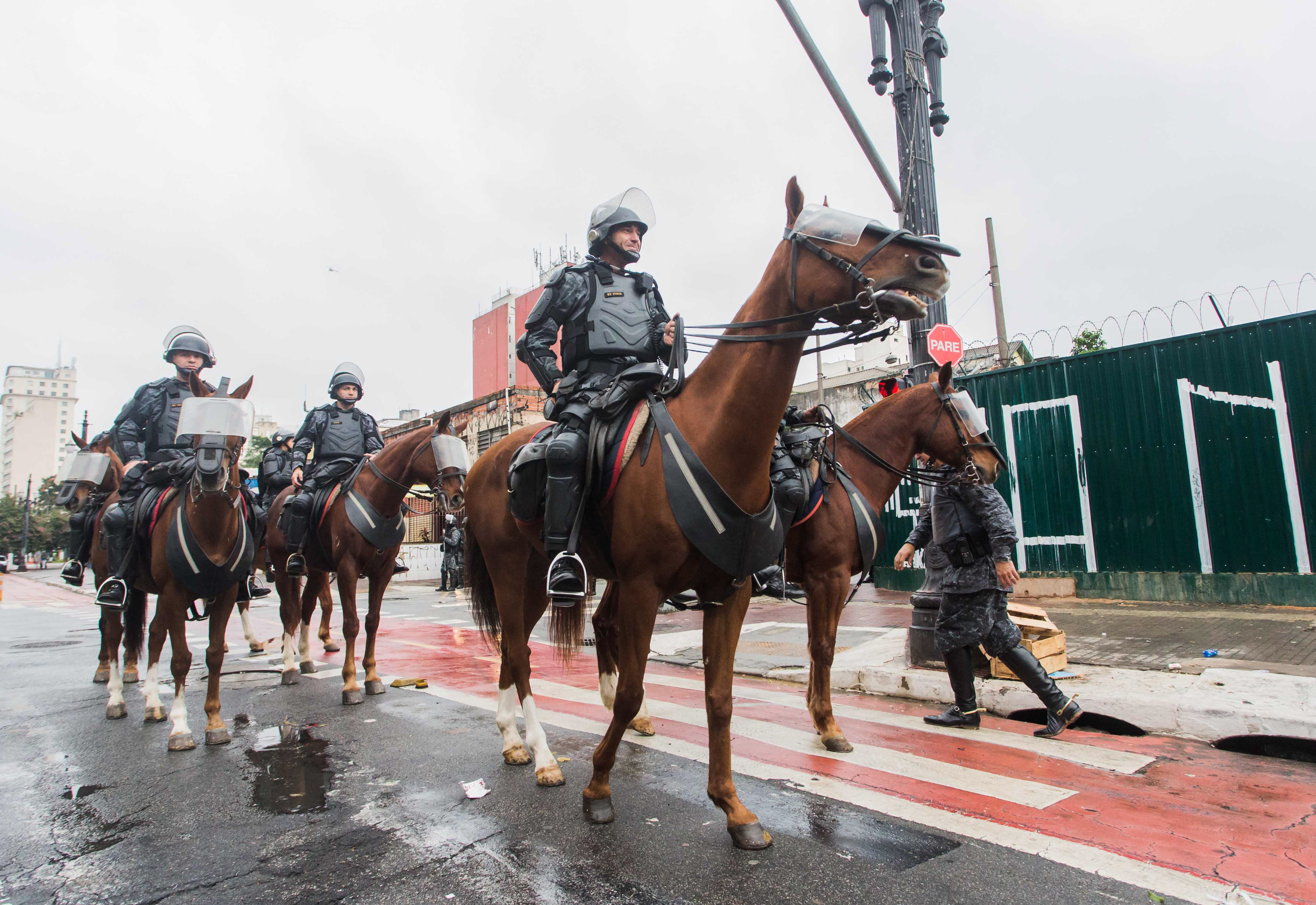 O Governador do Estado de São Paulo Geraldo Alckmin, participou de Blitz na Cracolândia. Local: São Paulo/SP. Data: 21/05/2017. Foto: Alexandre Carvalho/A2img